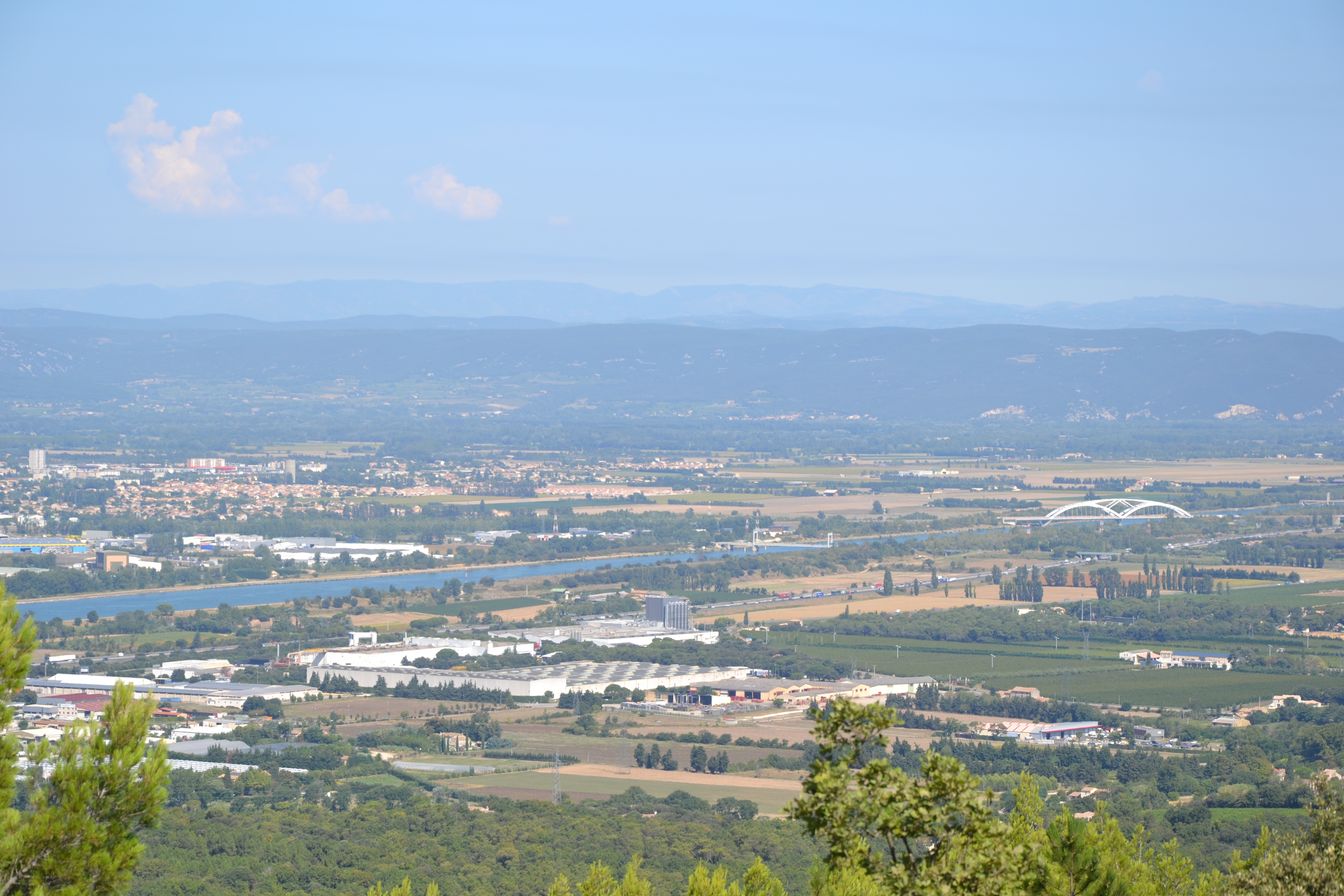 vue sur le canal de Donzère-Mondragon